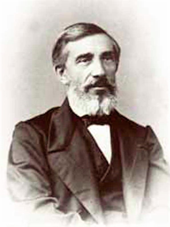 Izmail Ivanovič Sreznevskij (1812-1880), docente di filologia slava all'univerdità di San Pietroburgo. Professore di Nikolaj Černyševskij